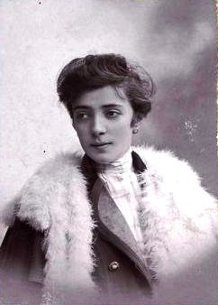 Aczél Ilona (Királyhelmec, 1884. november 7. – Budapest, 1940. március 5.) magyar színésznő akadémiai növendék korában.